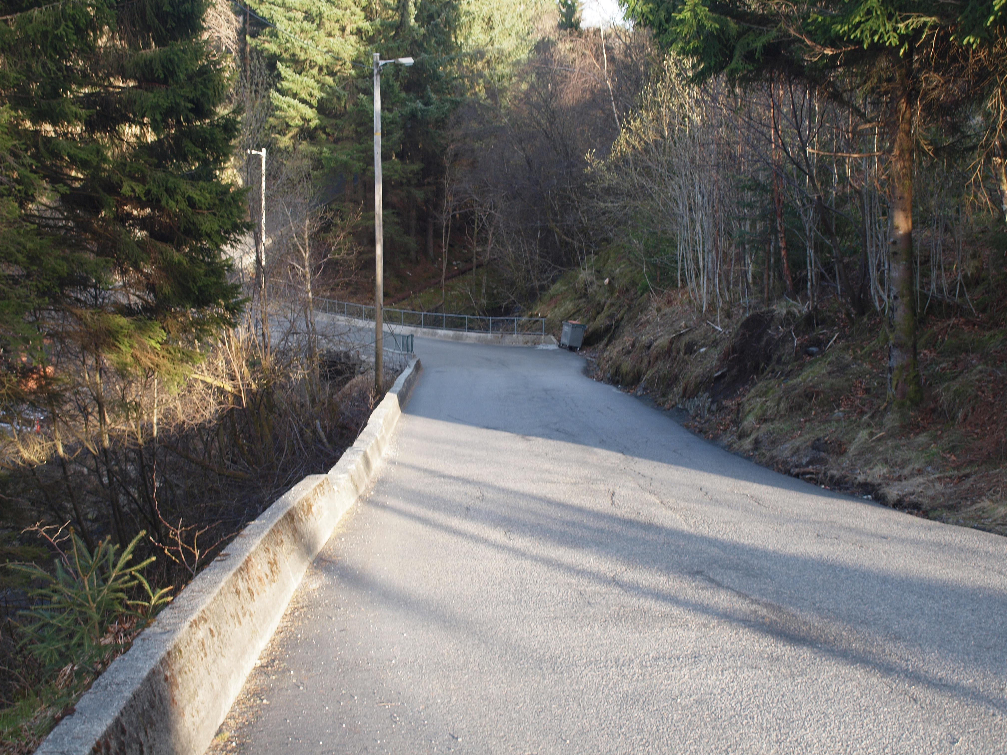 The river in Hylkje, Bergen, Norway